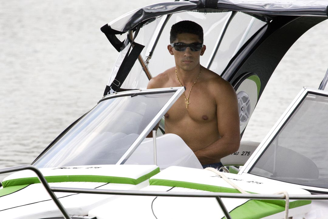 Brazil